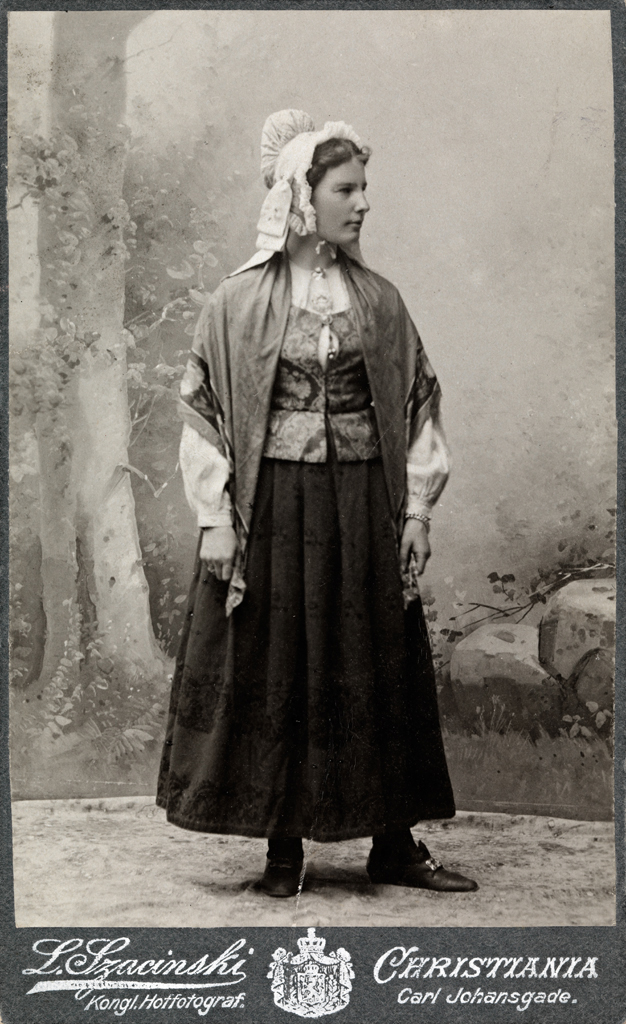 Tittel / Title: Kvinnebunad Motiv / Motif: Visittkort. Klara Semb, 16 år, i en Østerdalsbunad. Fotografiet har tilhørt Hulda Garborg. Fotograf / Photographer: L. Szacinski (Christiania) Eier / Owner Institution: Nasjonalbiblioteket / National Library of Norway Lenke / Link: Bildesignatur / Image Number: blds_03751